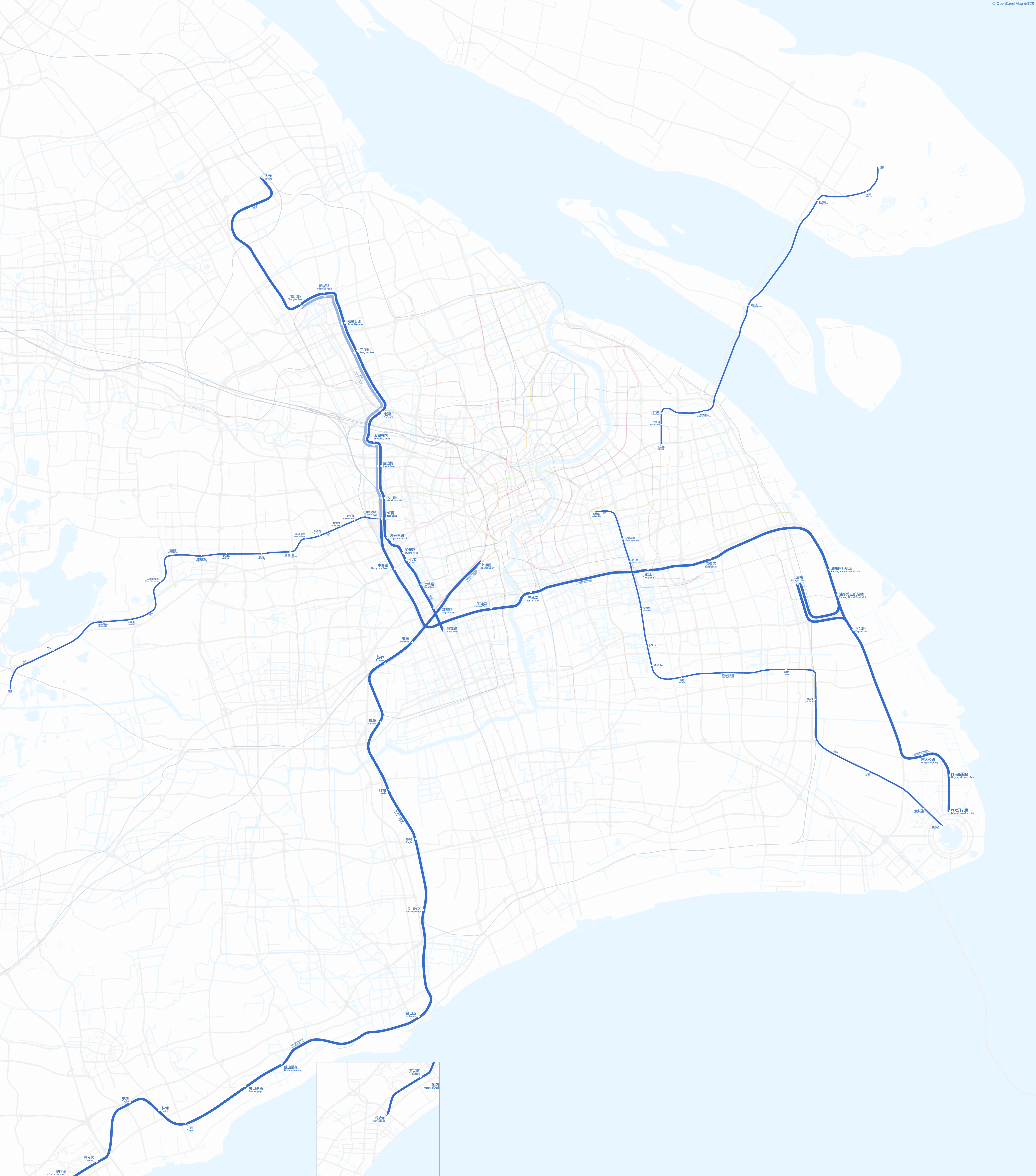 中文（中国大陆）: 上海市域轨道交通规划图（2025年），不包括16号线、17号线与崇明线